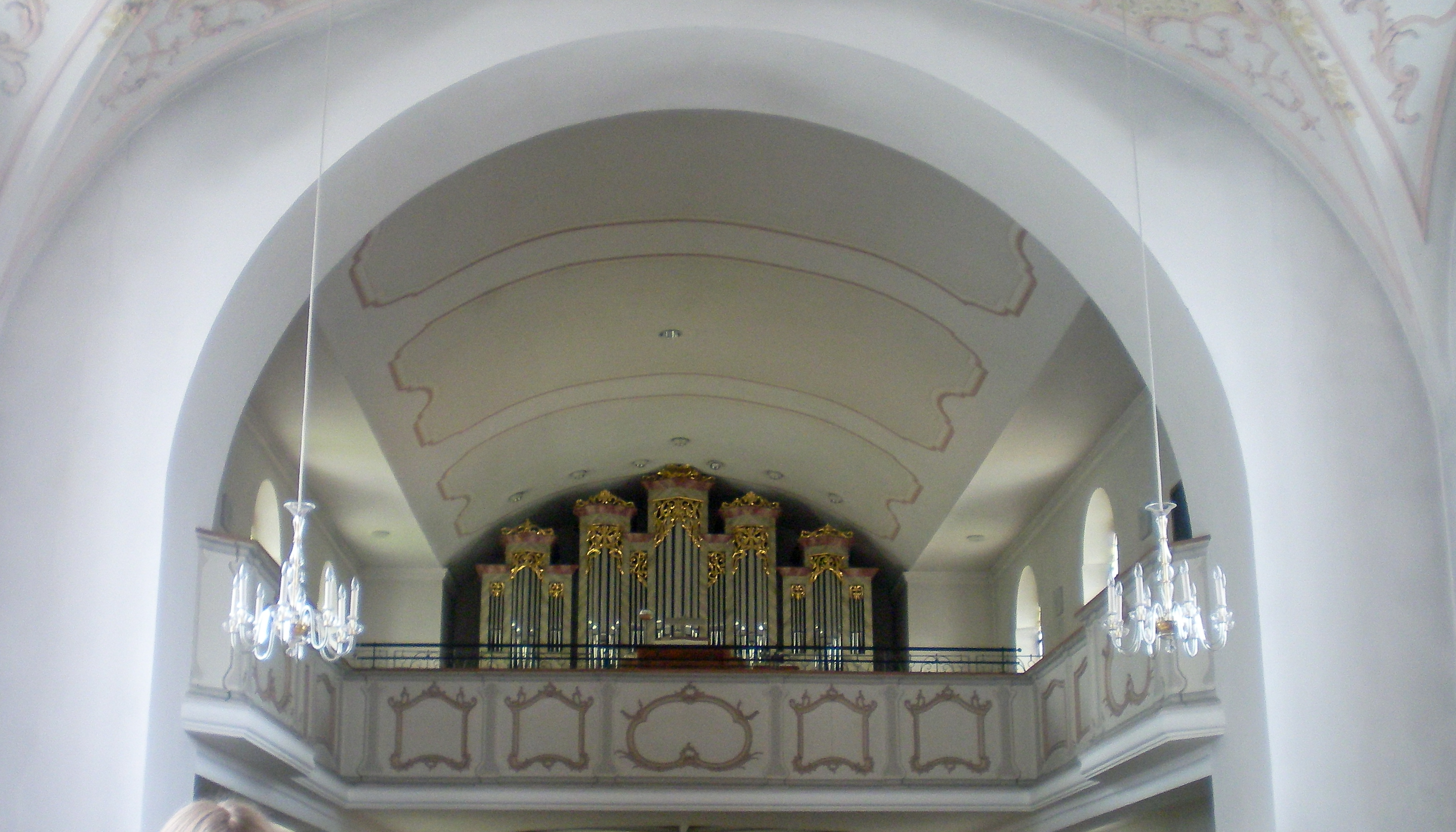 Blick in den Anbau der Pfarrkirche St. Michael in Kochel am See mit Empore und Orgel.